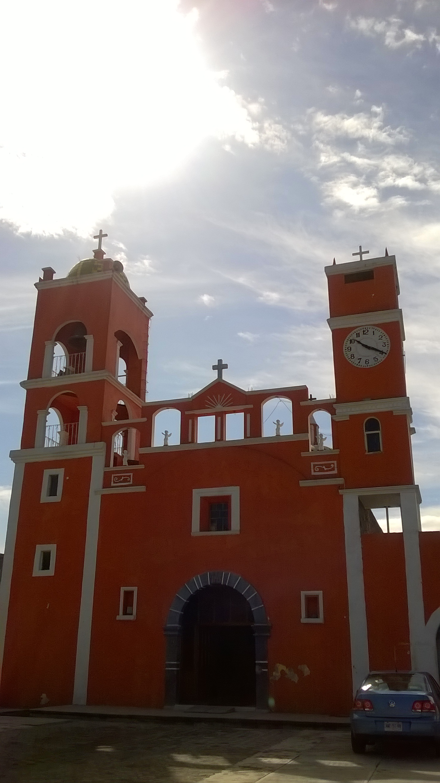 Iglesia de Santa Cruz Quilehtla, Tlaxcala